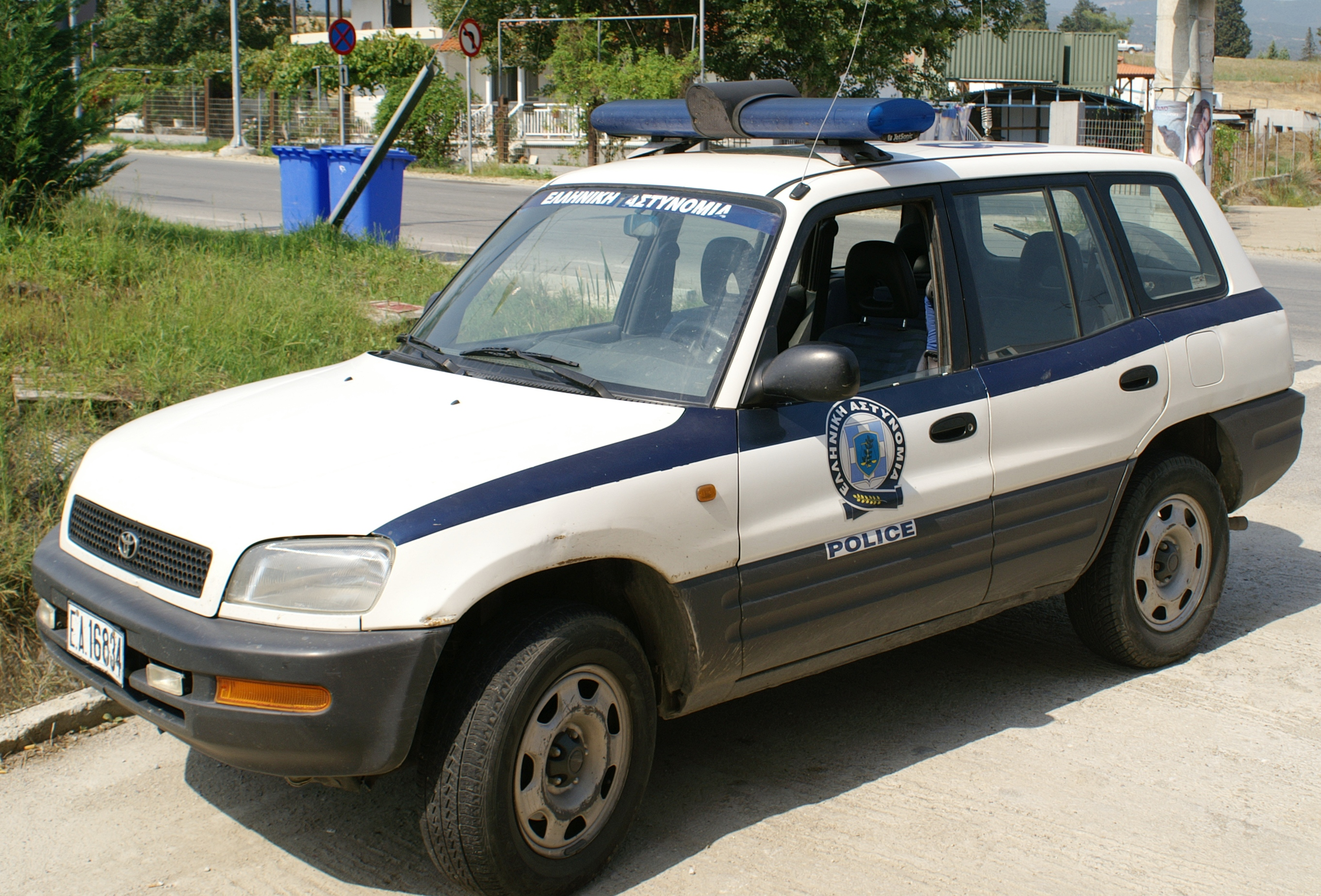 Griekse politie auto